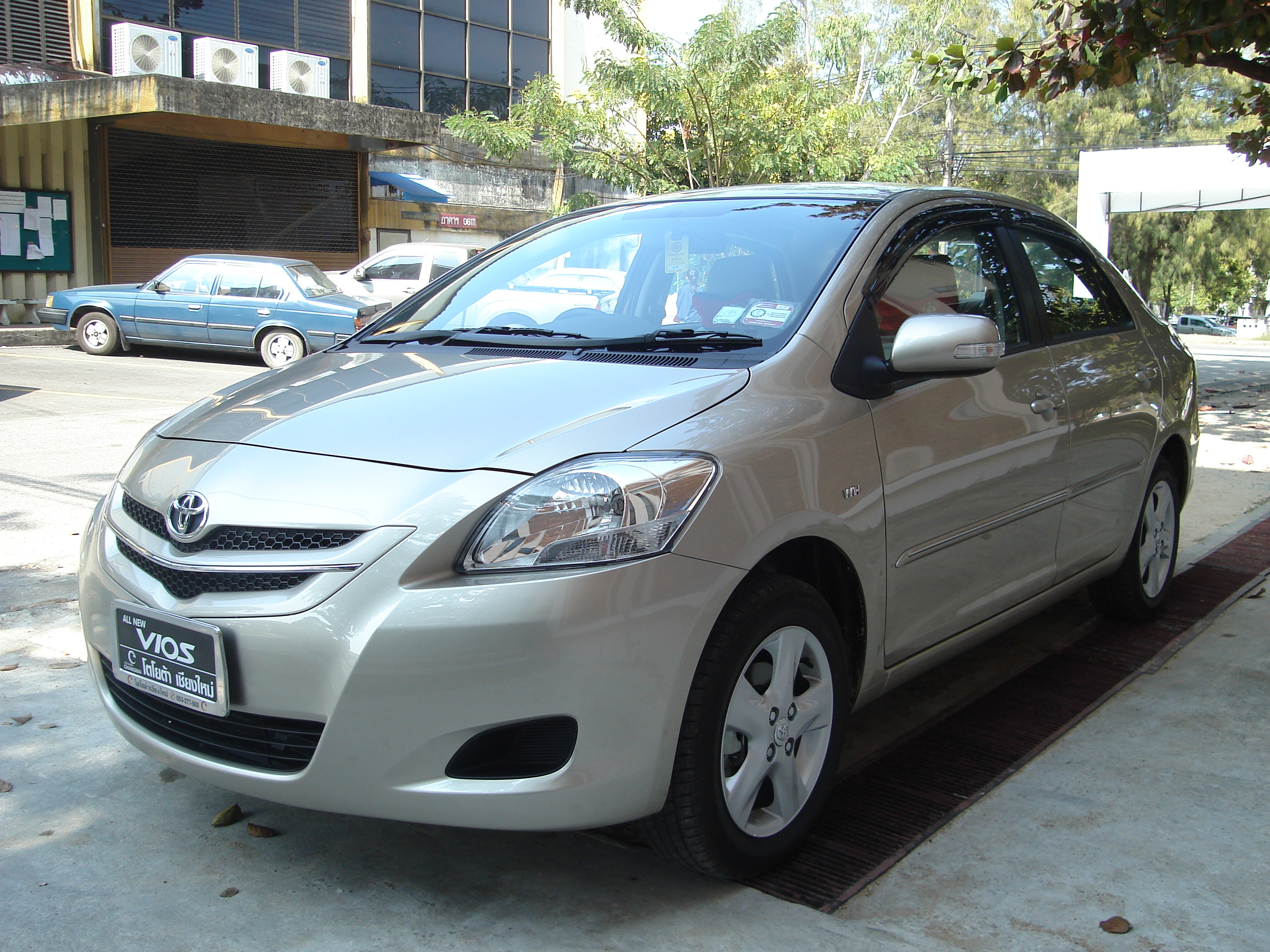 Toyota Vios -- Chiangmai, Thailand